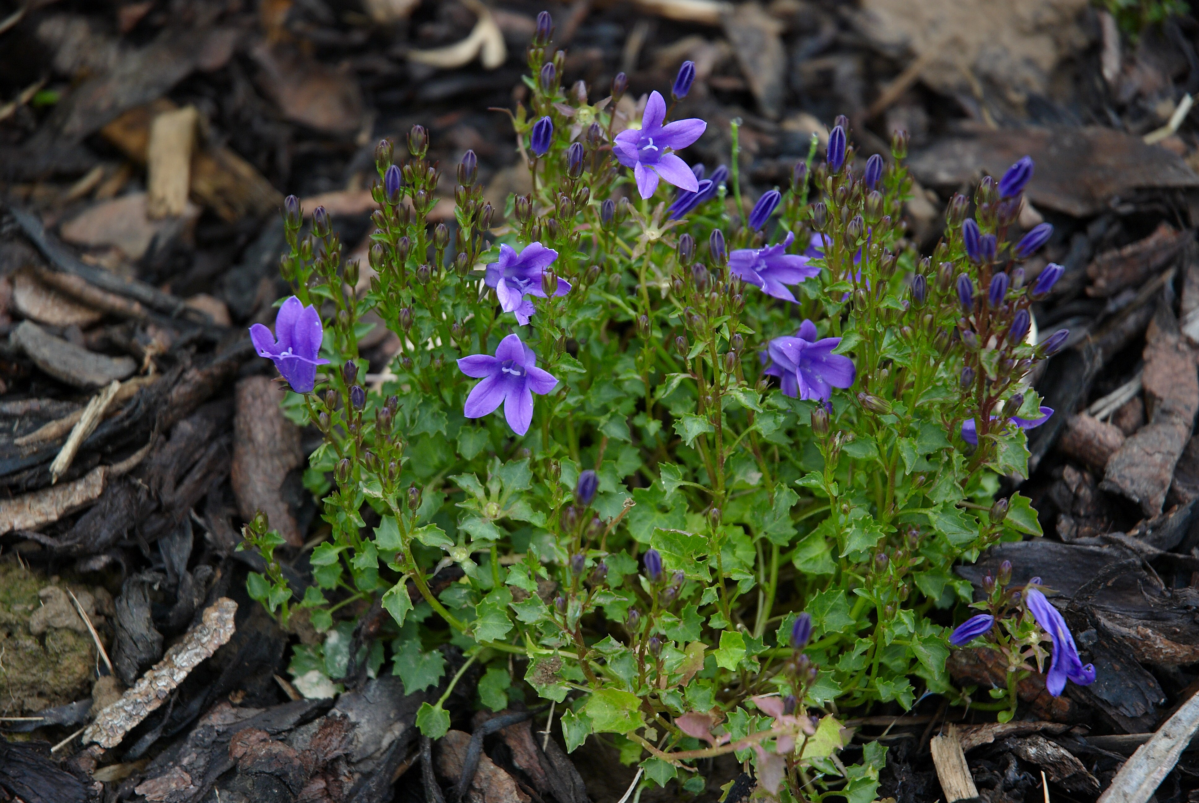 Campanula portenschlagiana (C. muralis)